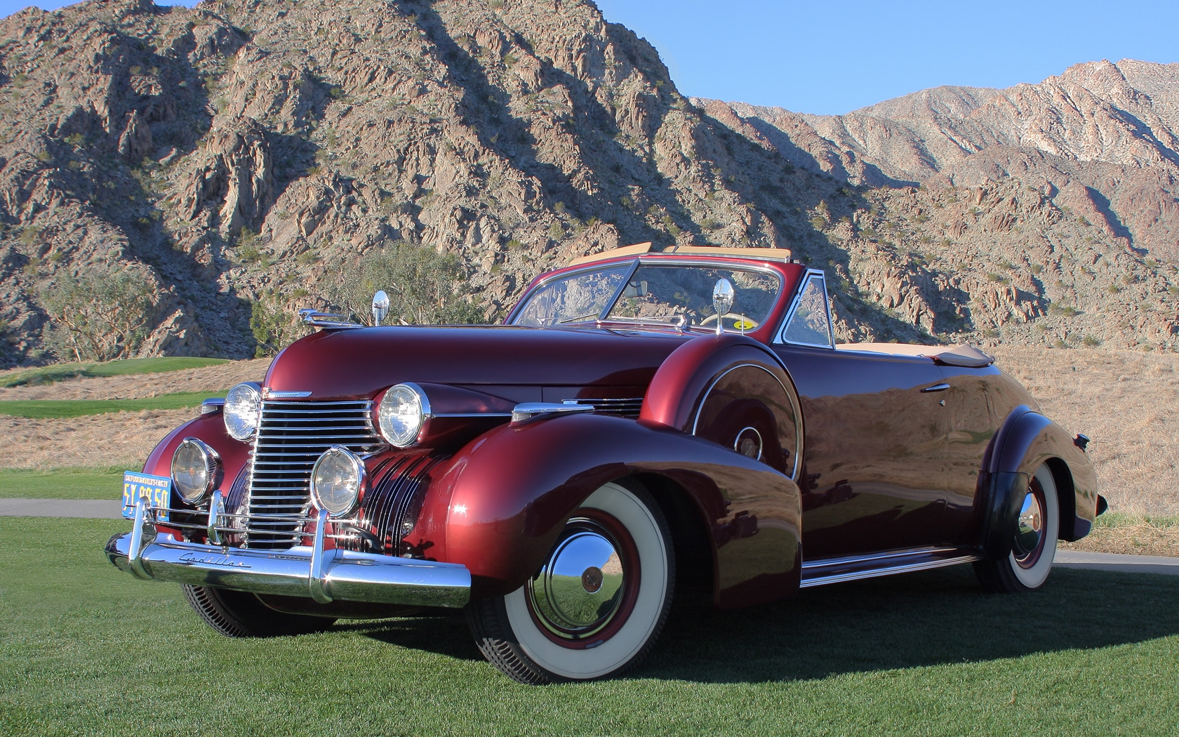 2011 Desert Classic, La Quinta, CA